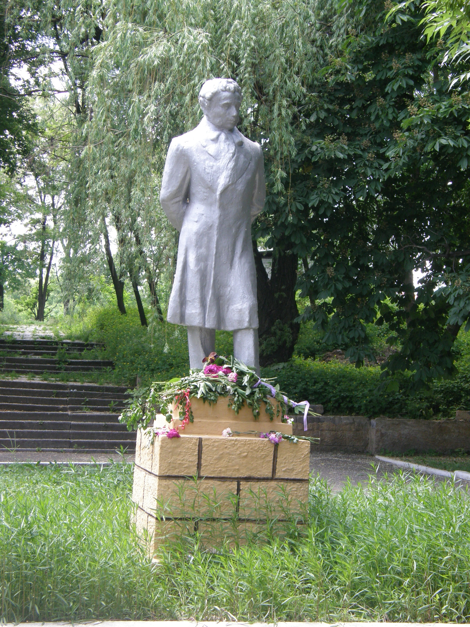 Памятник Пушкину в Будённовском районе Донецка